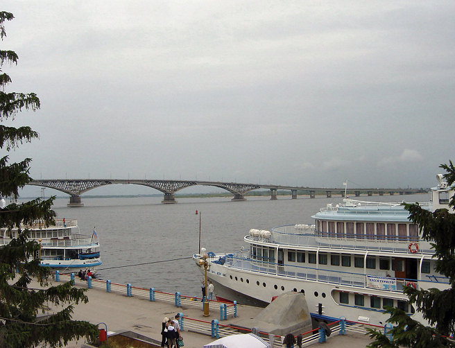 Saratov, brug over de Volga